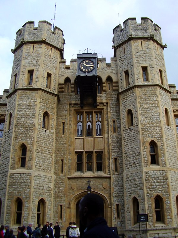 De Tower of London. Zelf gemaakt